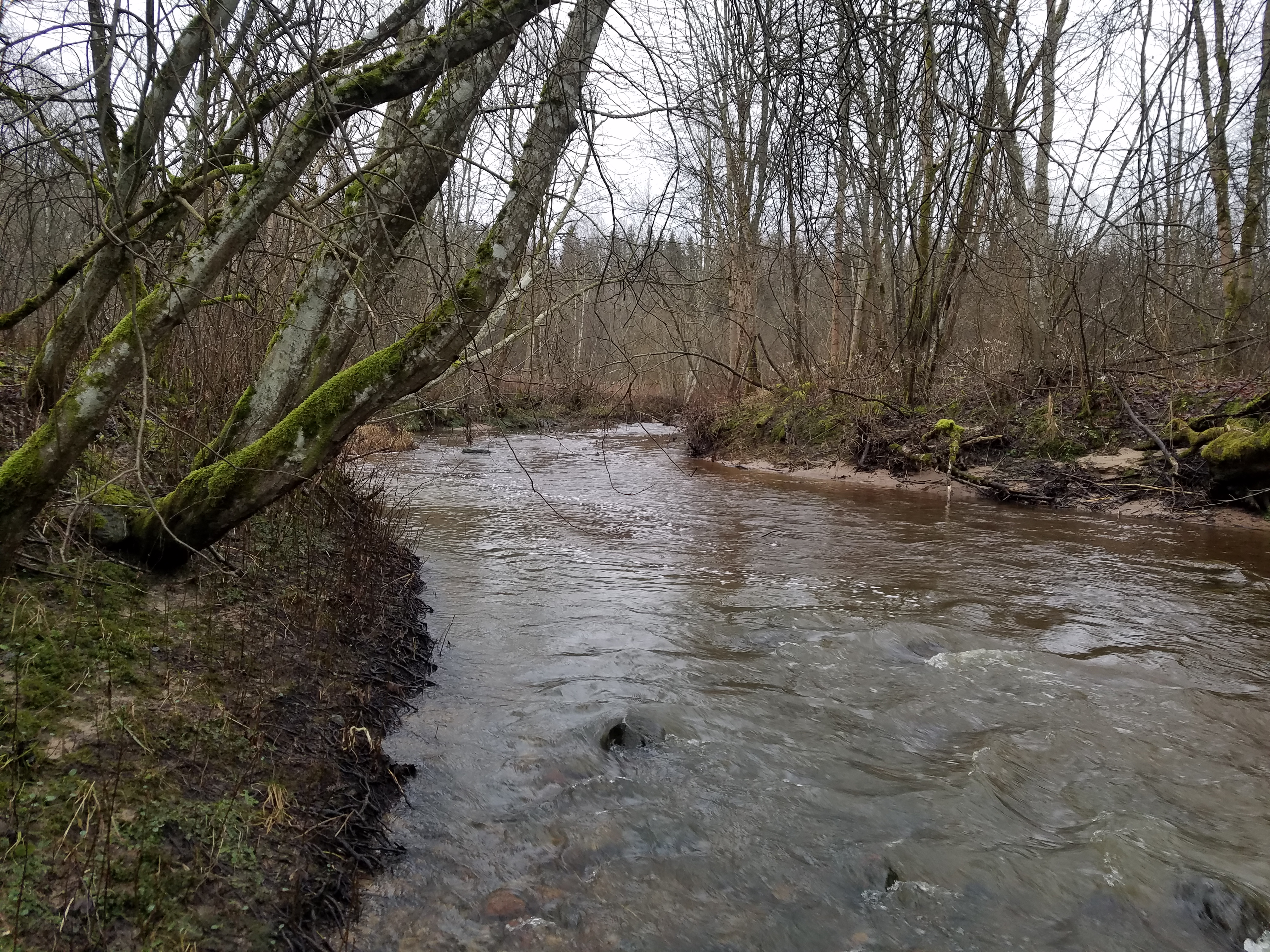 Alantas už santakos su Karkluojė